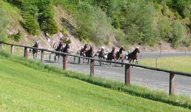 Lafferer Trabrennbahn St. Johann in Tirol